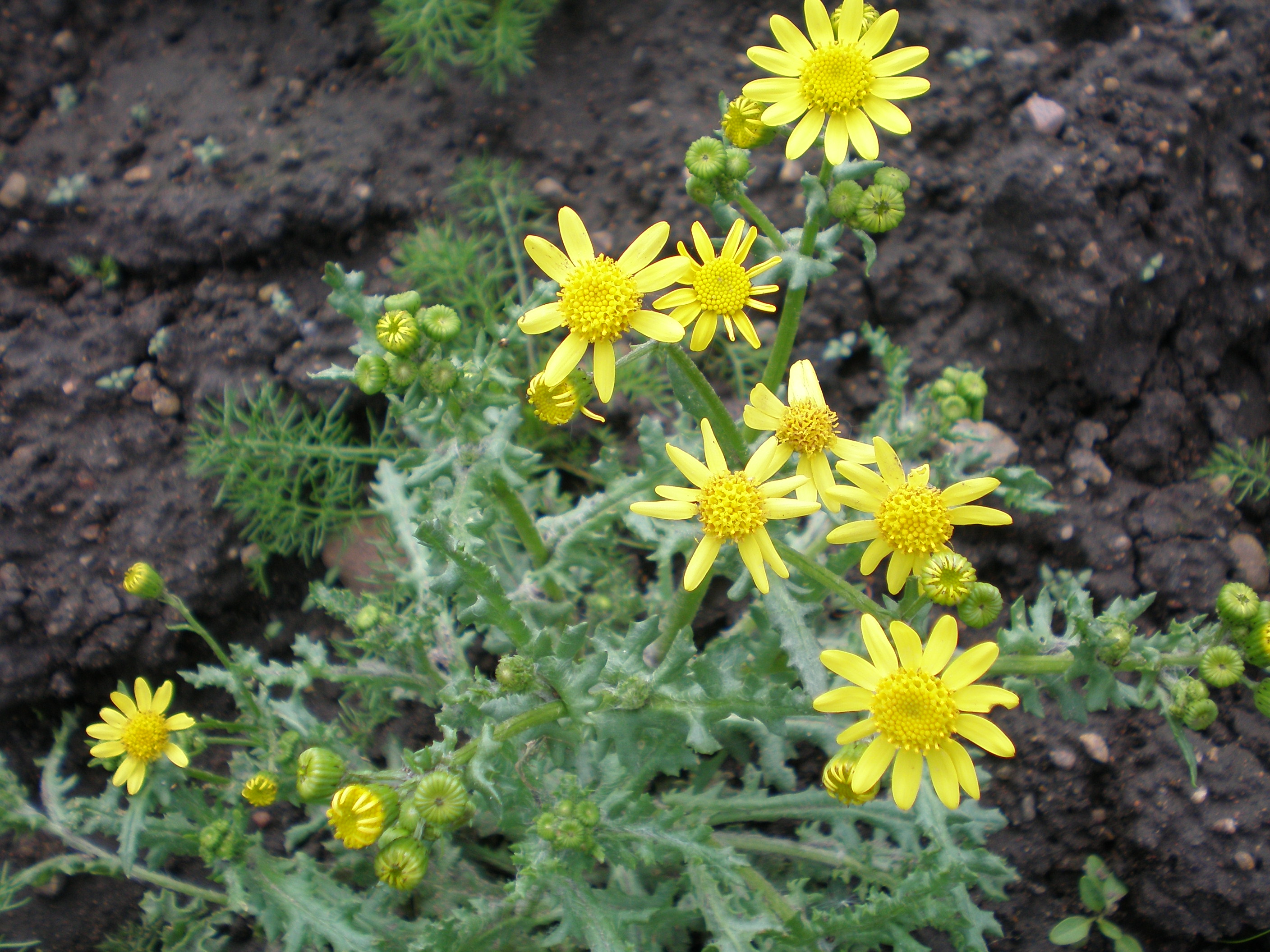 Senecio vernalis